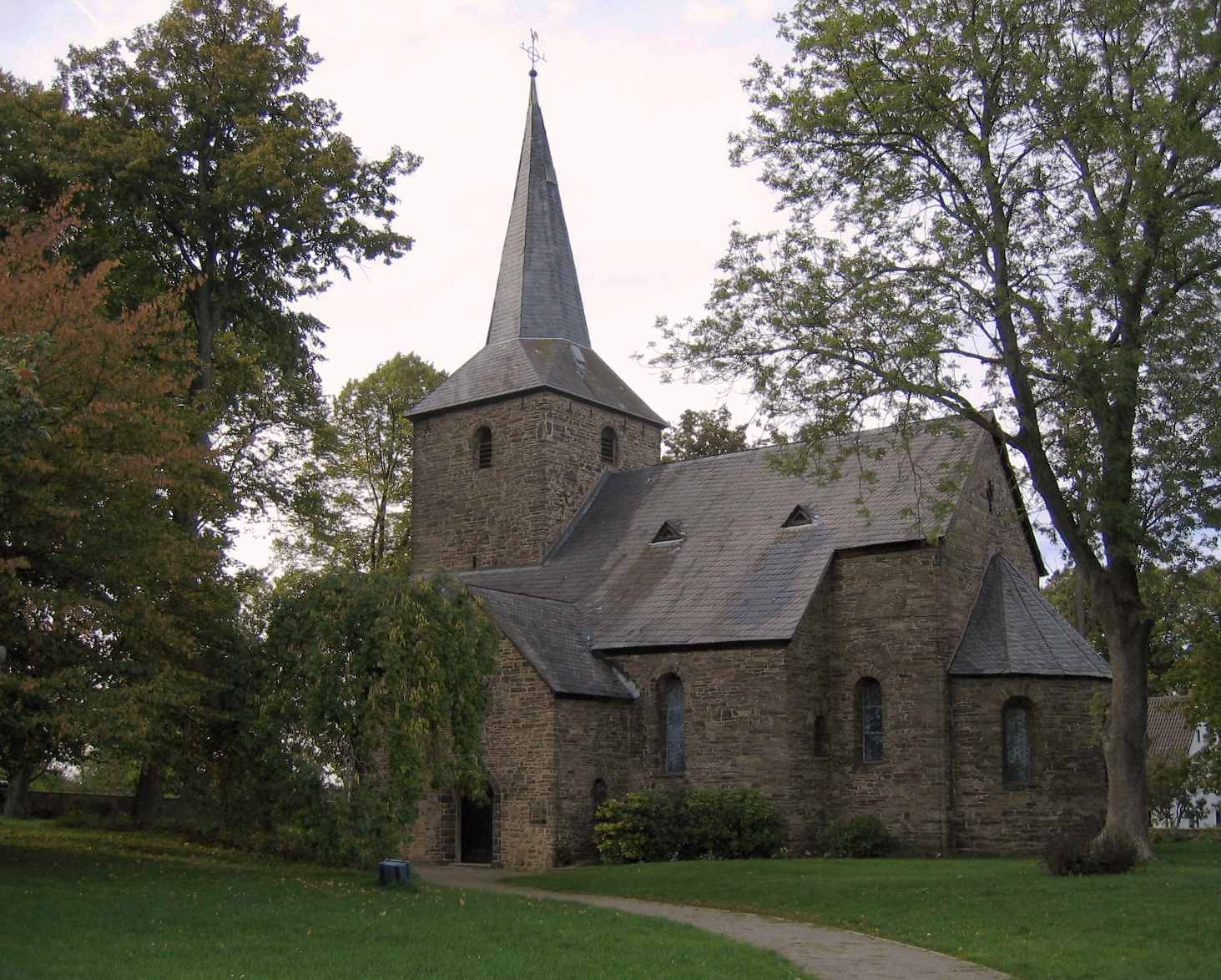 „Spätromanische Dorfkirche zu Wiblingwerde“ der Gemeinde Nachrodt-Wiblingwerde.